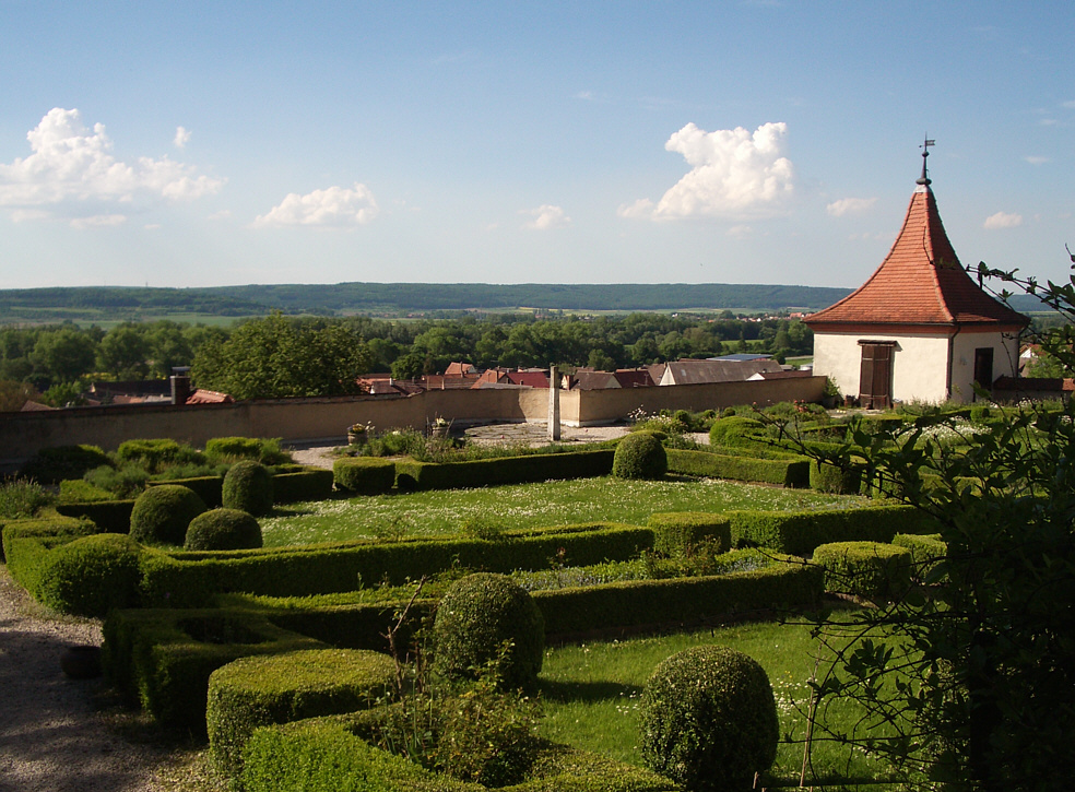 Neufra an der Donau, Riedlingen, Germany: Hängegarten mit Eckturm